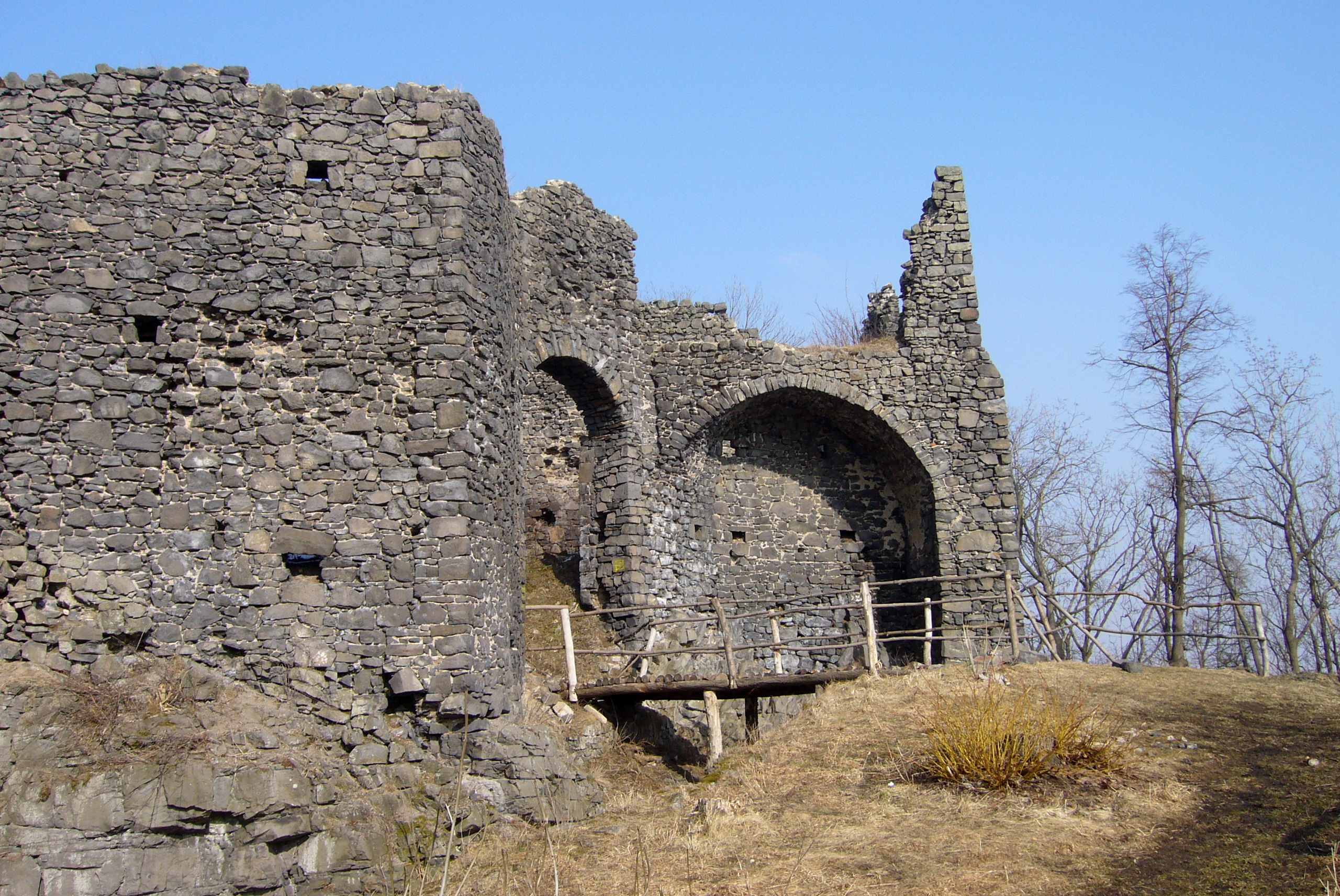 Hrad Šumburk - nálevkovitě rozšířený prostor před hlavní bránou